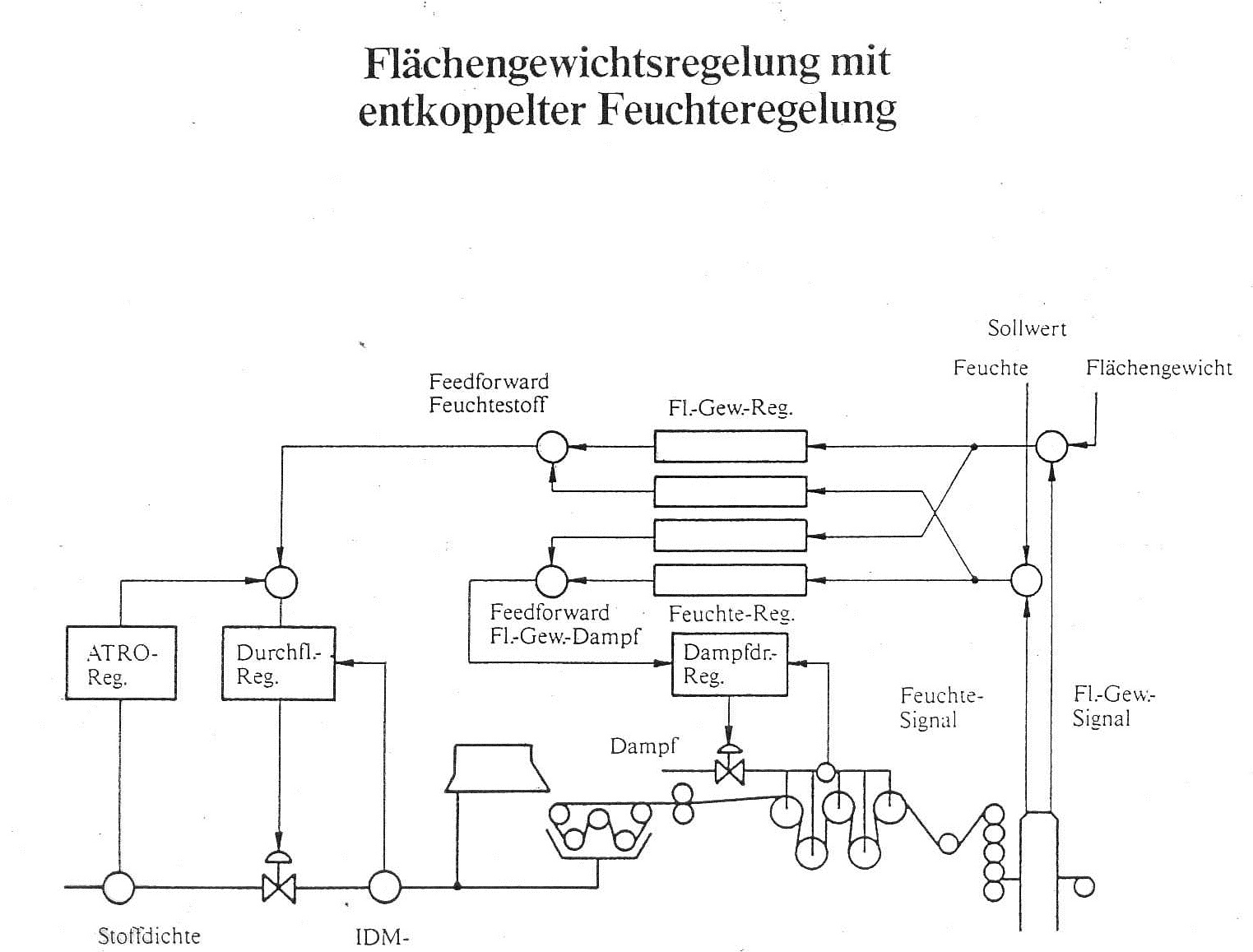 Schema der Flächengewichtsregelung mit entkoppelter Feuchteregelung an einer Papiermaschine